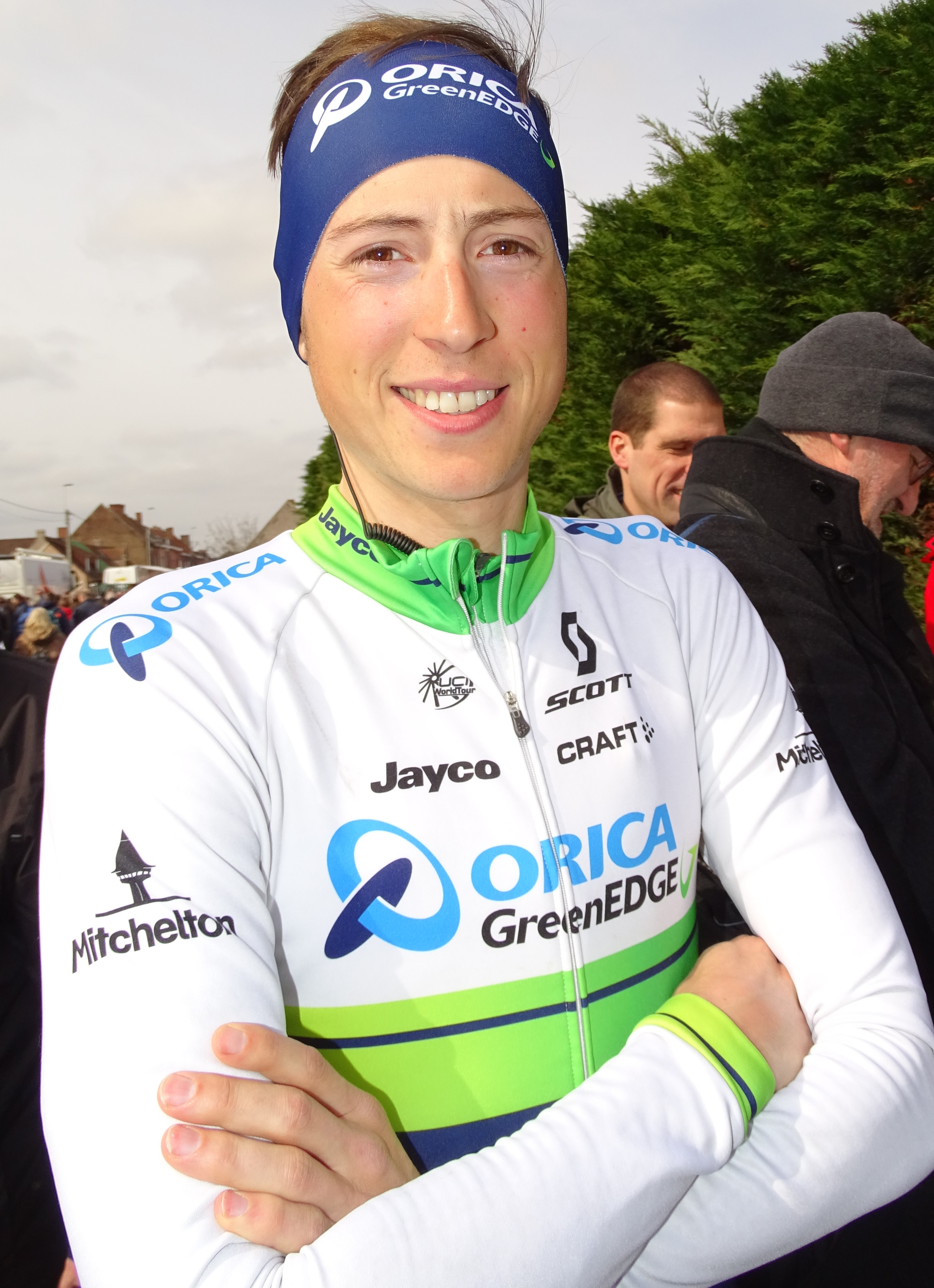 Reportage réalisé le vendredi 27 mars à l'occasion du départ et de l'arrivée du Grand Prix E3 2015 à Harelbeke, Belgique.